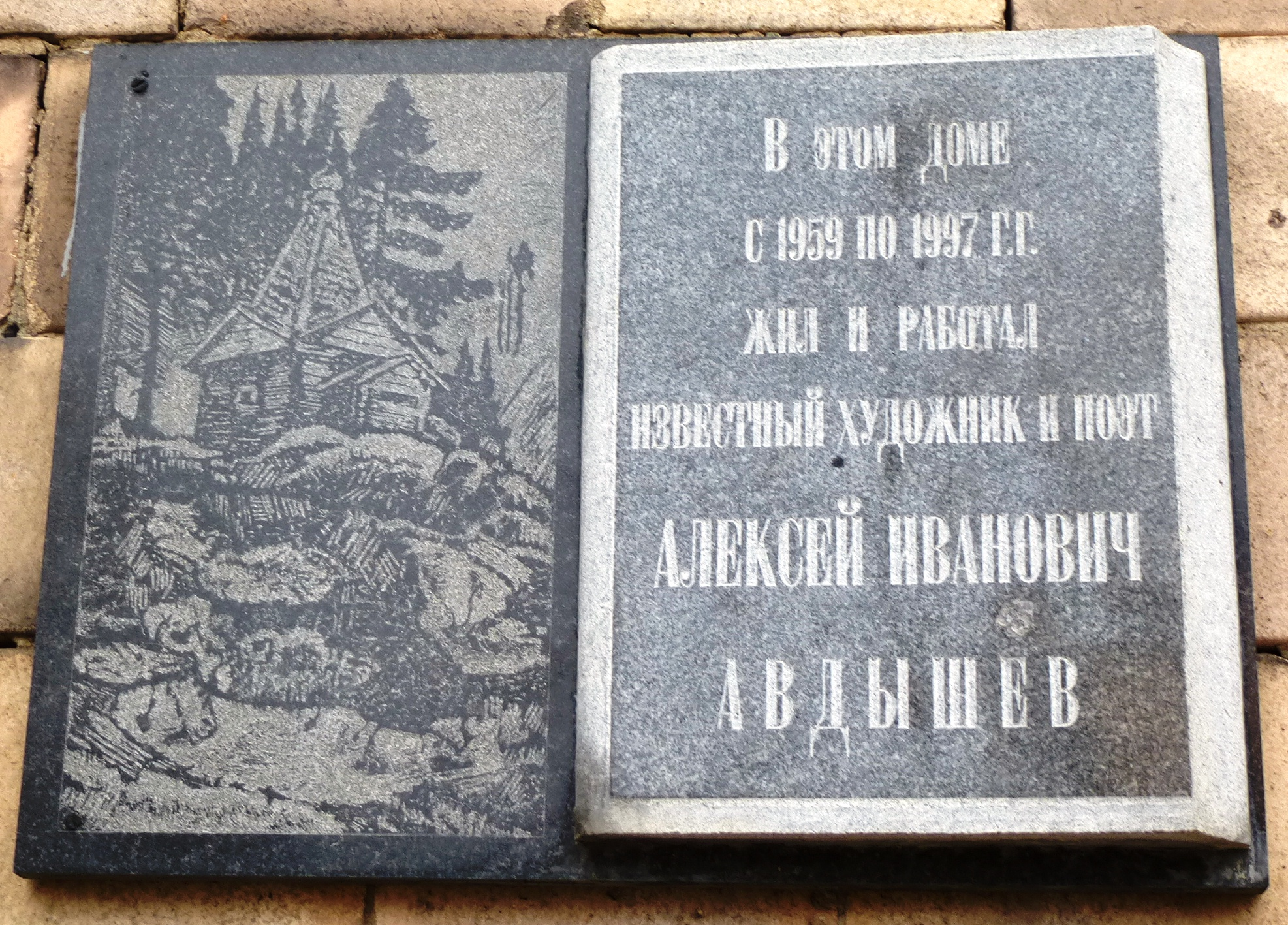 Мемориальная доска на доме № 14 по ул. Куйбышева в Петрозаводске